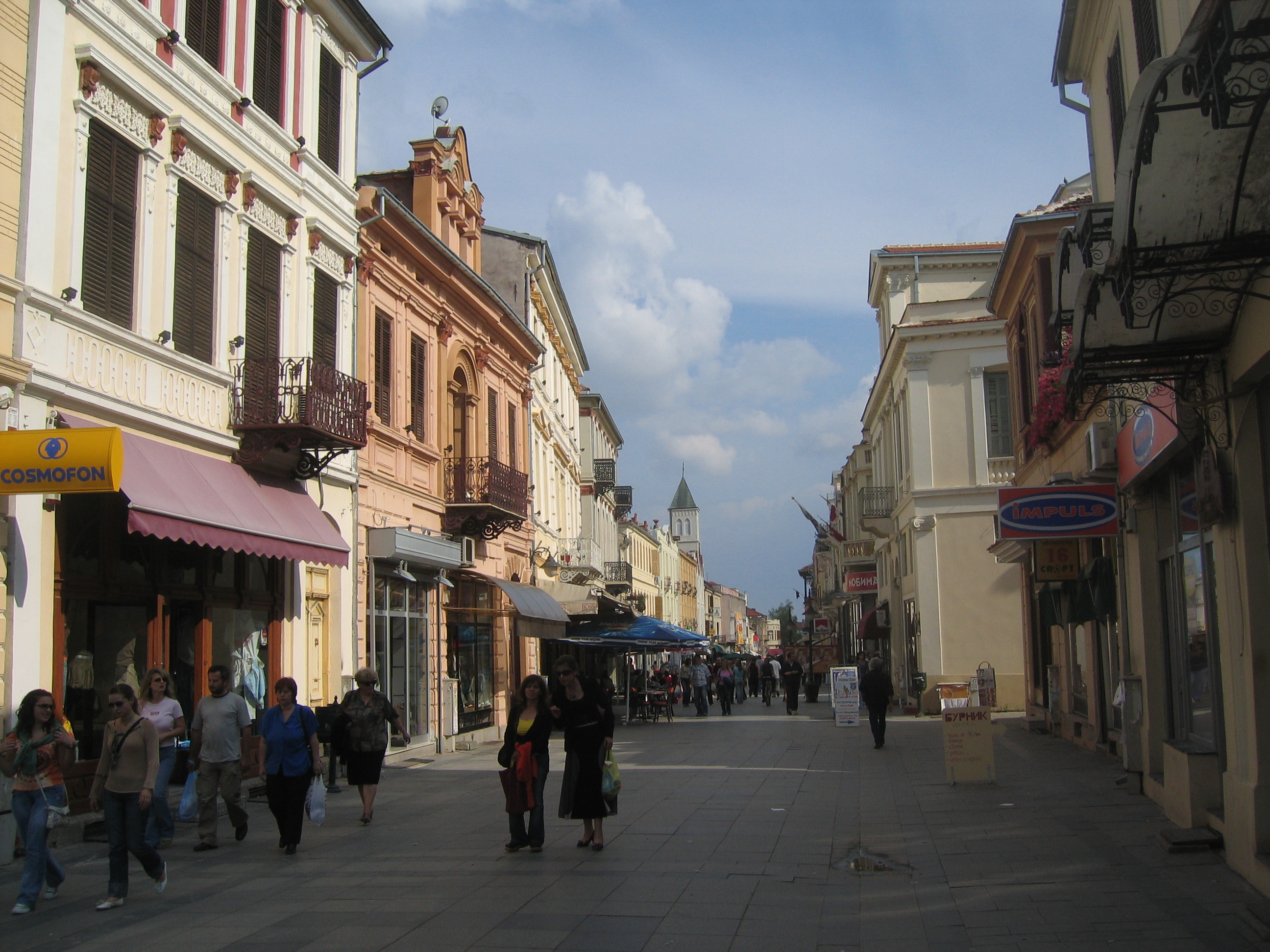 Širok Sokak, Bitola